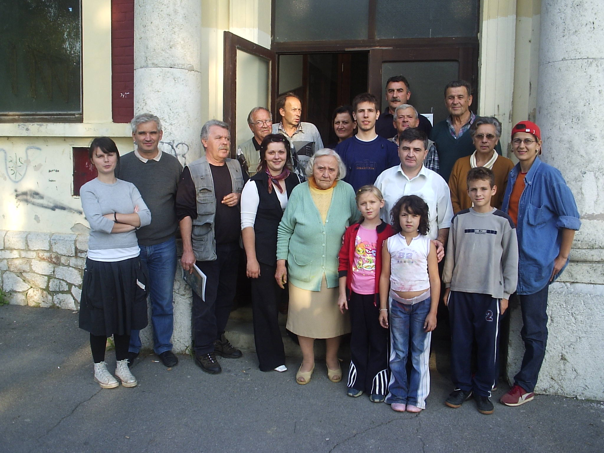 en: Đola 2005., art colony, Darda, 2005. Đola 2005., likovna kolonija, Darda, 2005.